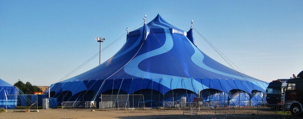 Le chapiteau du Cirque éducatif installé "square du cirque" à Sin le Noble (59450, département du Nord)